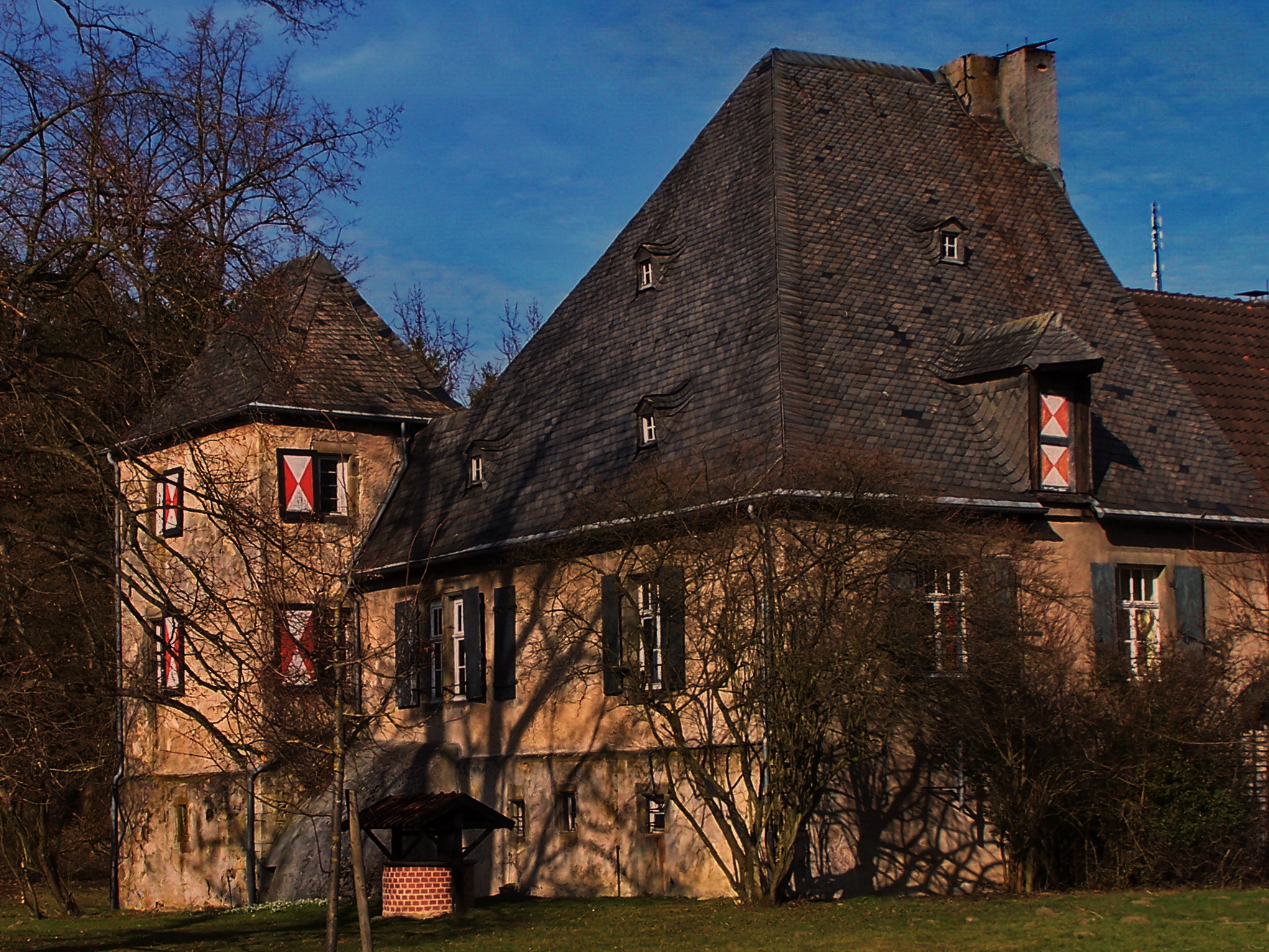 Haus Welschenbeck - Historisches Rittergut im Warsteiner Ortsteil Belecke This image shows a heritage building in Germany, located in the North Rhine-Westphalian city Warstein (no. A II 20).